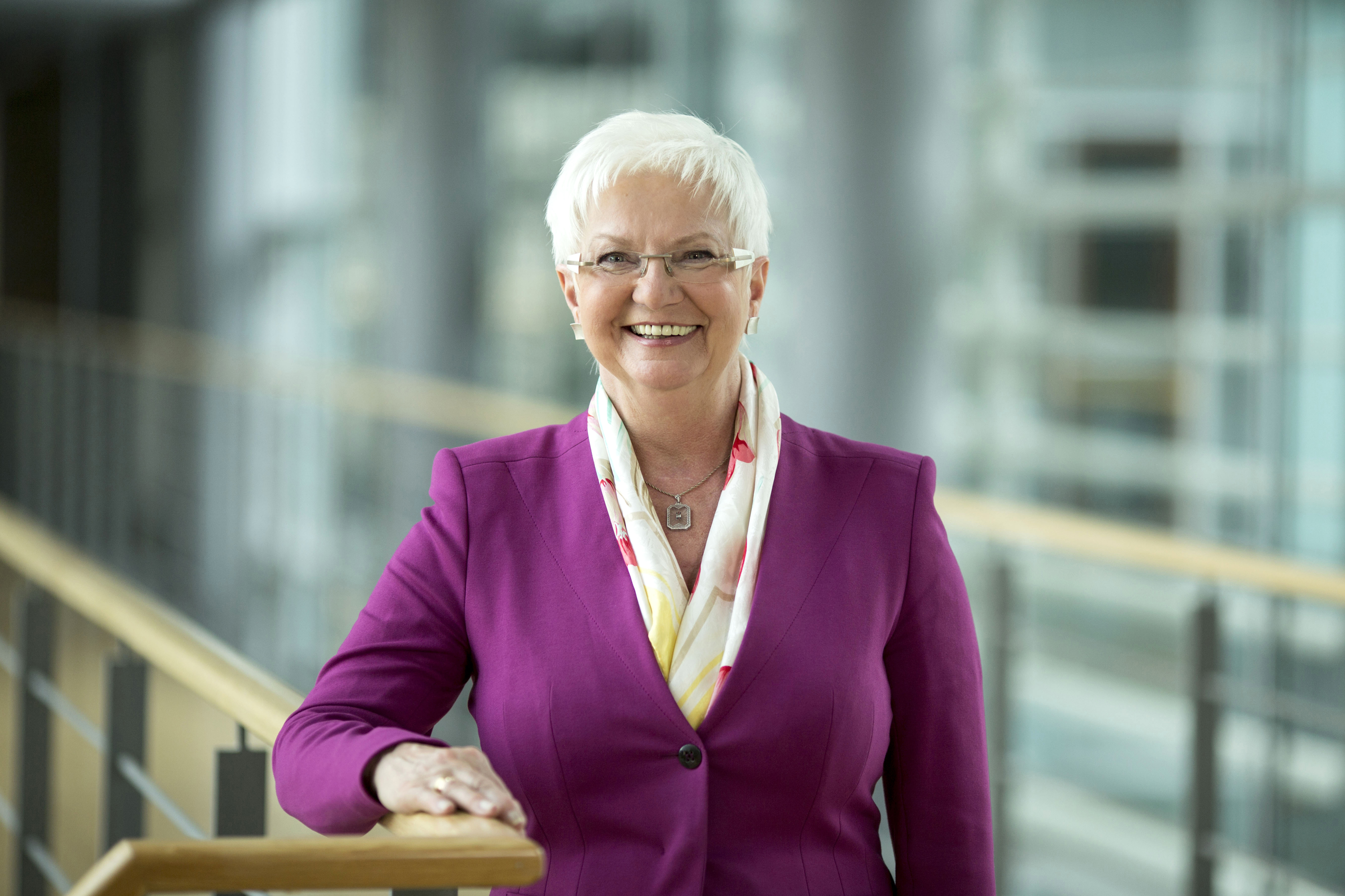 Gerda Hasselfeldt, MdB (2013)